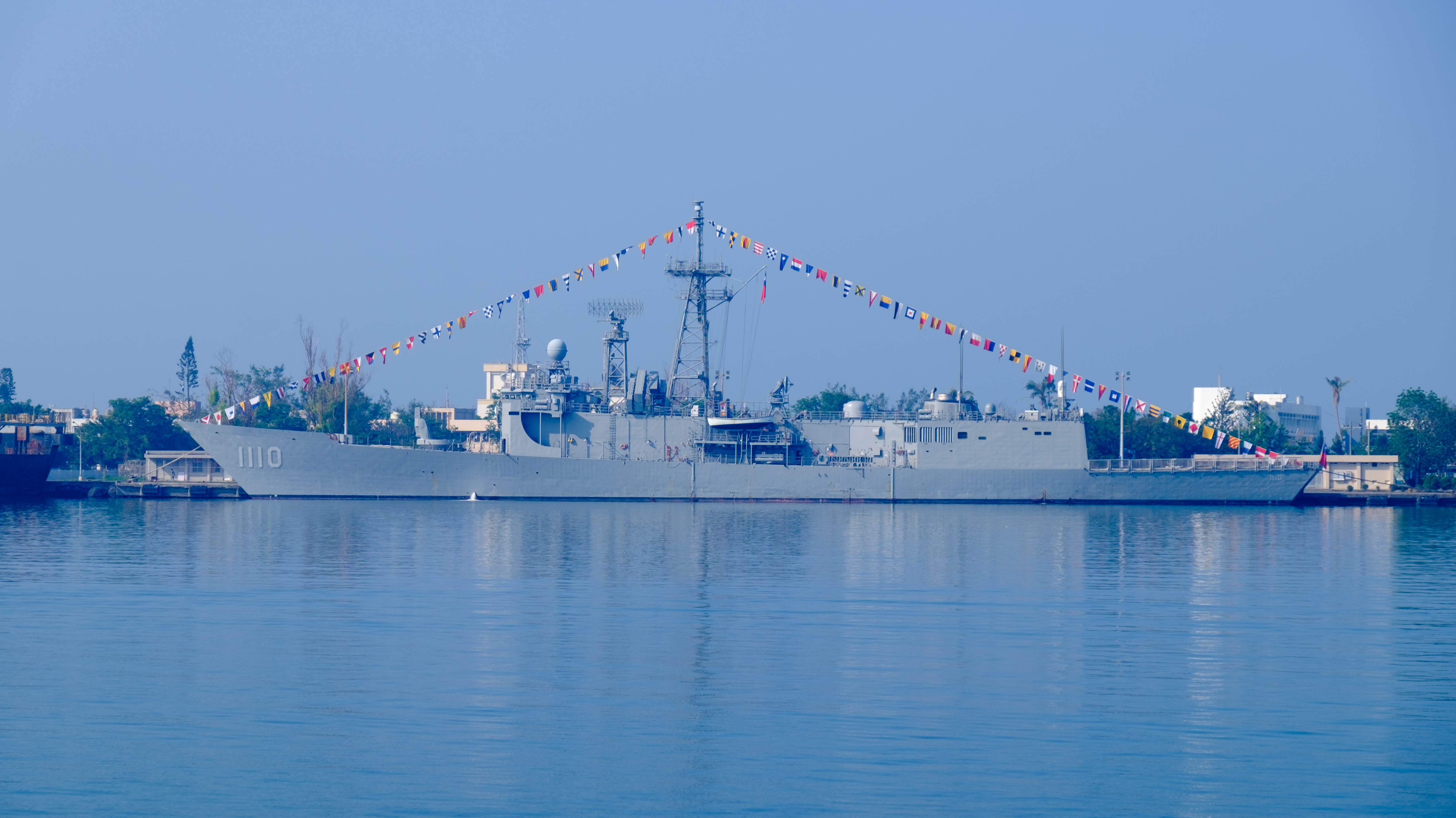 停泊左營軍港的成功級飛彈巡防艦田單（PFG2-1110），攝於2016年營區開放活動上午。